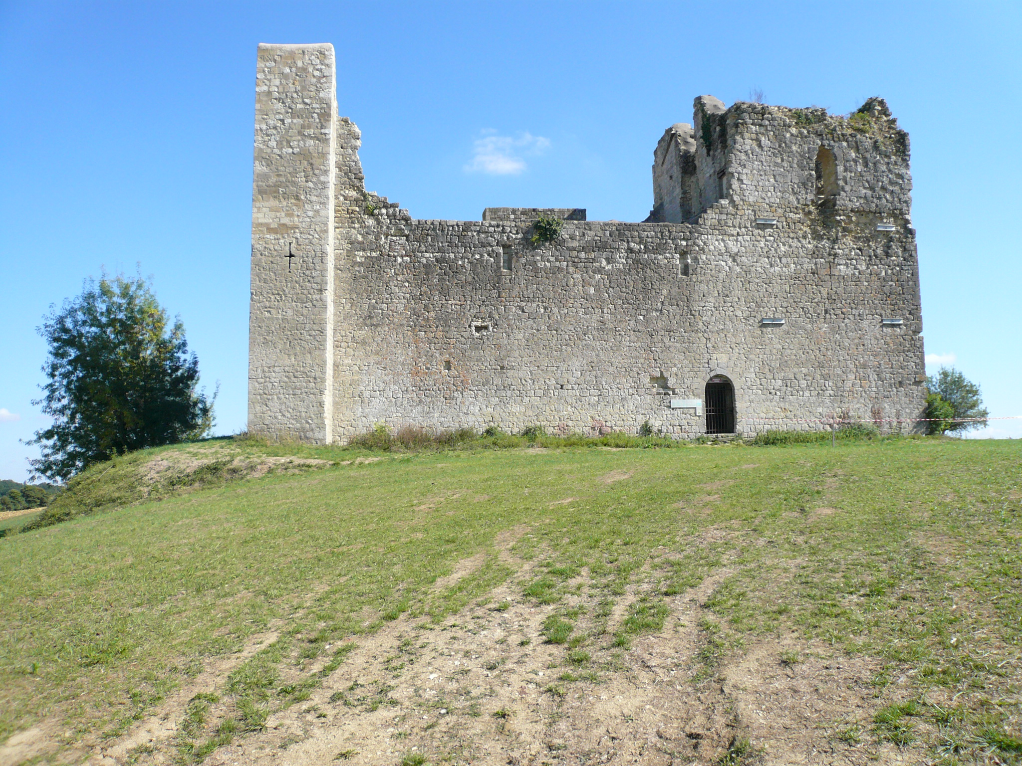 Château de Lagardère